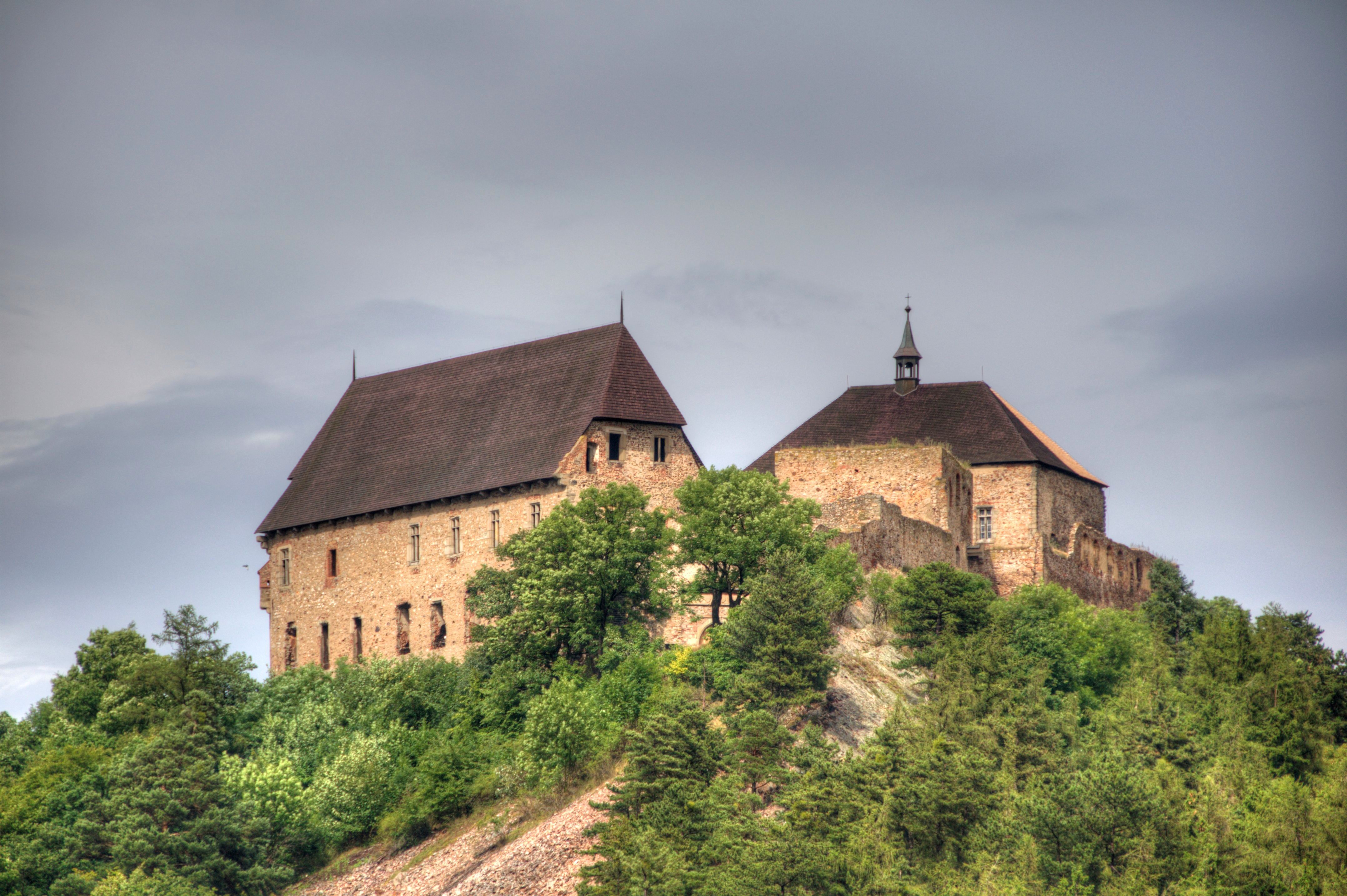 Celkový pohled na hrad od jihozápadu